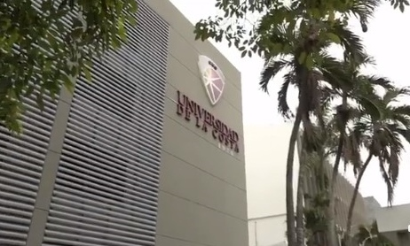 fachada cuc